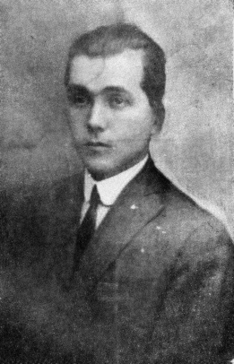 fotografia de Emilio